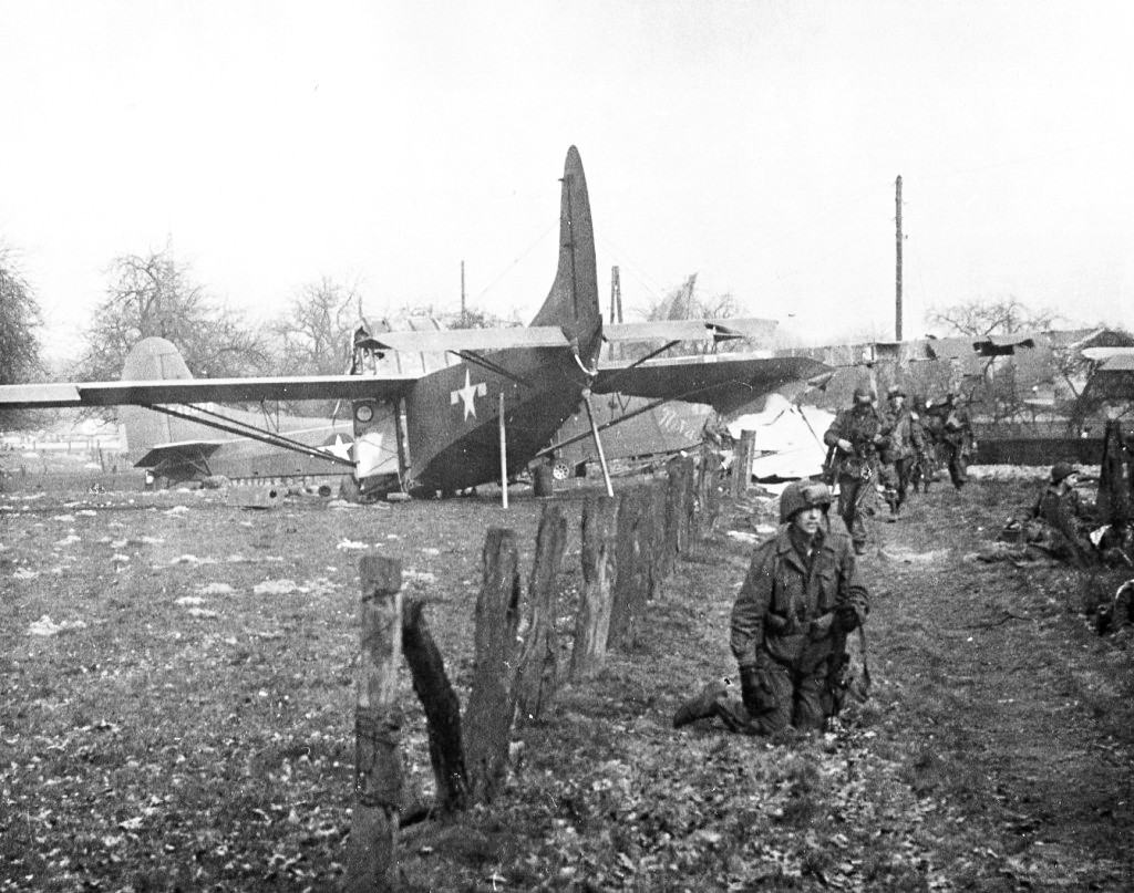 GLIDER TROOPS AFTER LANDING NEAR WESEL